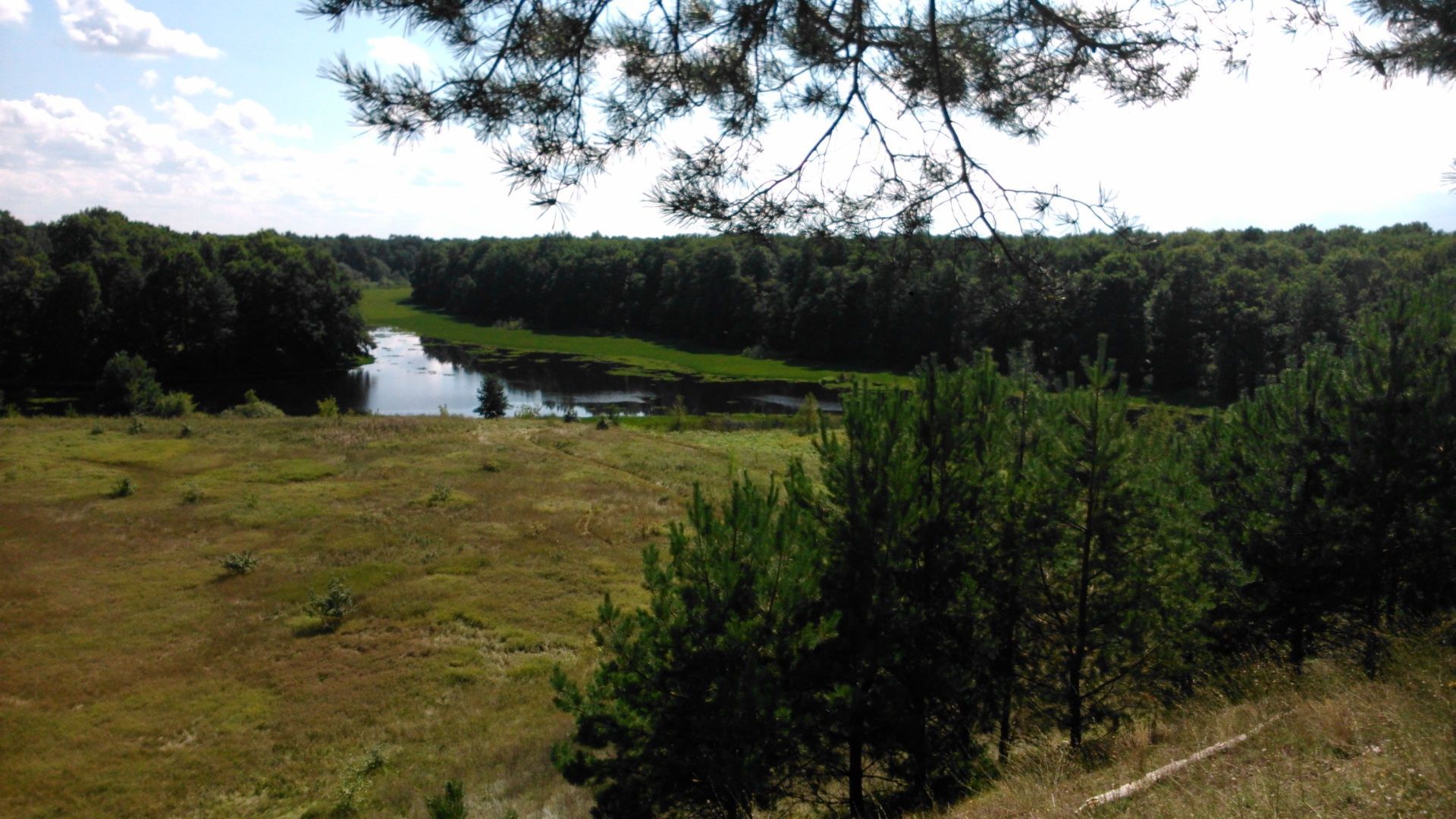 Тереховская дубрава с озерами Чудино и Кужиха: Боровское лес-во, кв. 136-149,Терехово,Шиловский район, Рязанская область This image is related to the protected area of Russia number 6210188